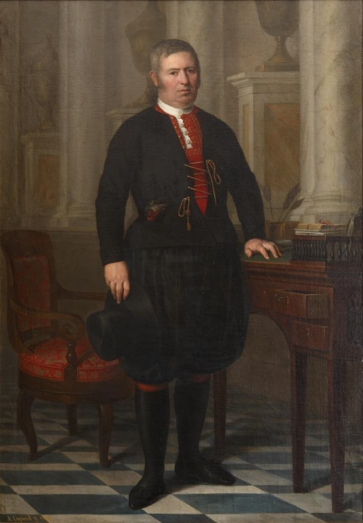 Retrato del político y financiero español Santiago Alonso Cordero (1793-1865), apodado el Maragato y personaje destacado en el Madrid de su época por su gran fortuna y por su liberalismo.